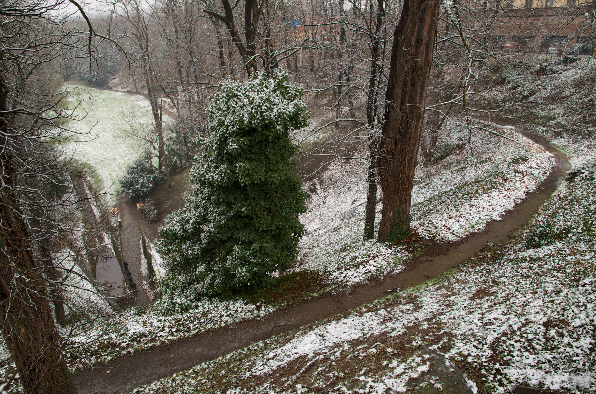 Horní Jelení příkop v zimě, pohled z Prašného mostu. Vlevo louka a Brusnice přitékající do tunelu pod náspem Prašného mostu.